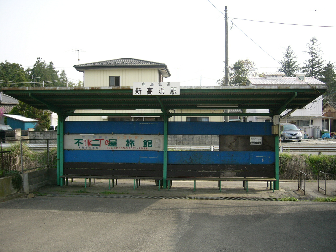 Shintakahama Station